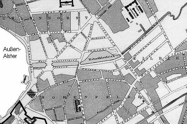 Der Eilbekkanal mit dem Kuhmühlenteich im Hamburg um 1880